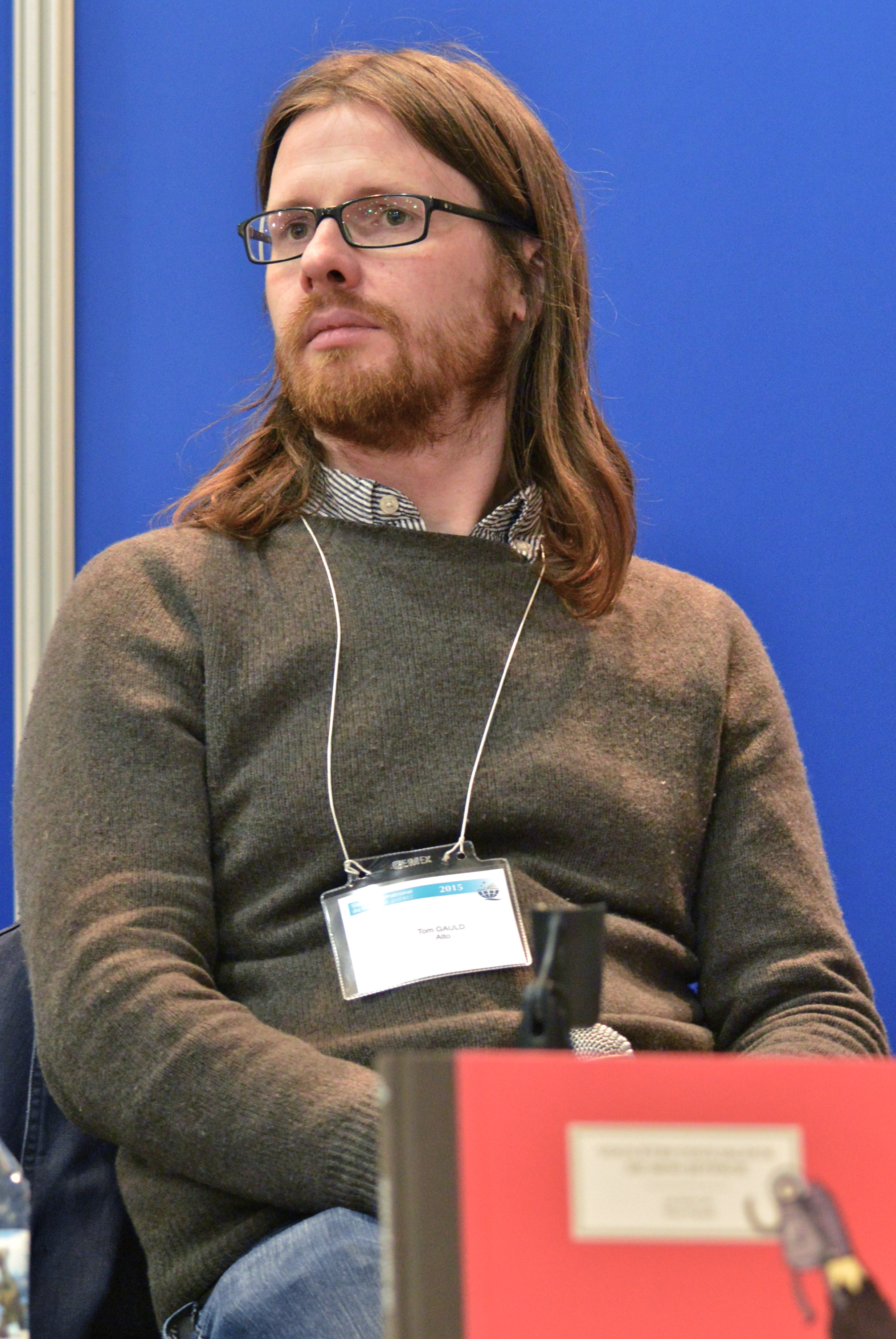 Le caricaturiste écossais Tom Gauld au Salon international du livre de Québec 2015